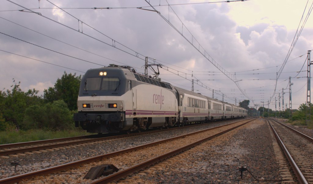 Tot i el contrallum, els núvols ens van permetre fotografiar el Garcí Lorca al seu pas per Mont-roig del Camp.